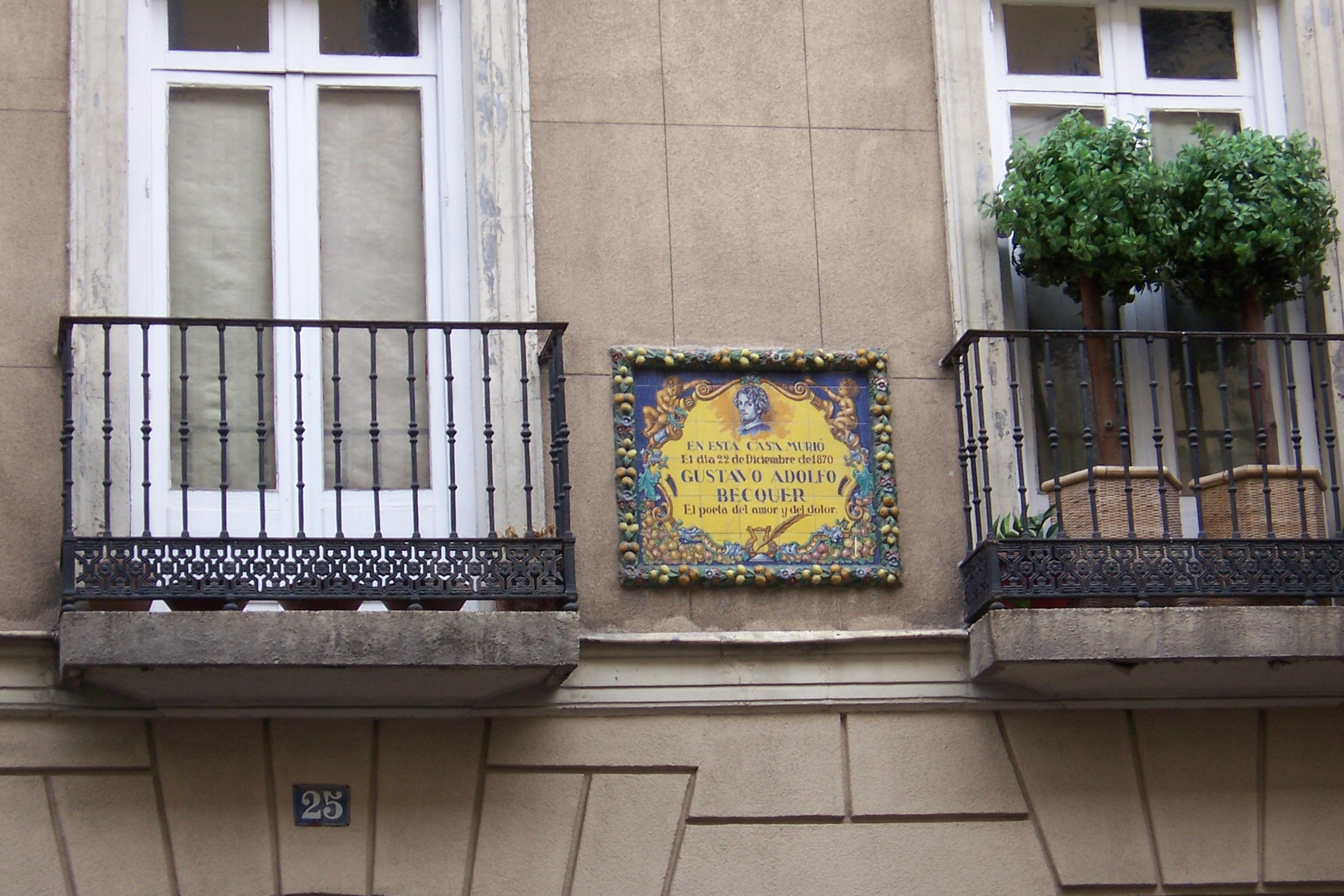 Madrid, España. Calle de Claudio Coello nº 25; placa conmemorativa de la muerte de Gustavo Adolfo Bécquer.